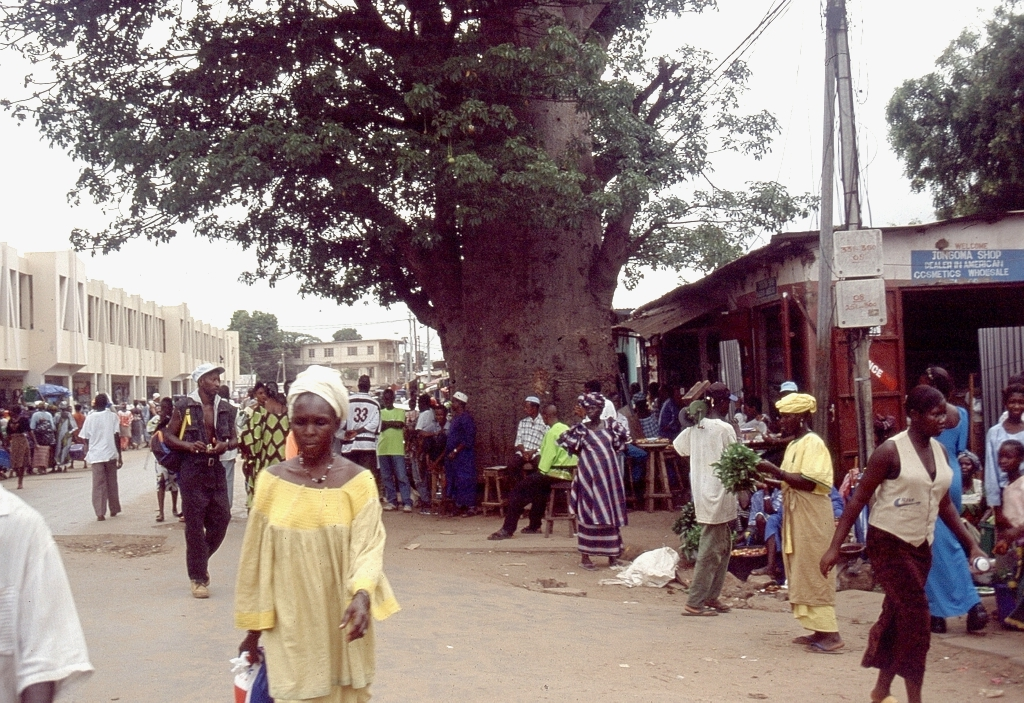 Marktoneel in Serekunda, Gambië, met 'n kremetartboom op die agtergrond.